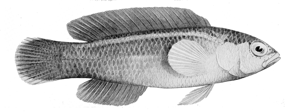 Pseudochromis tapeinosoma male